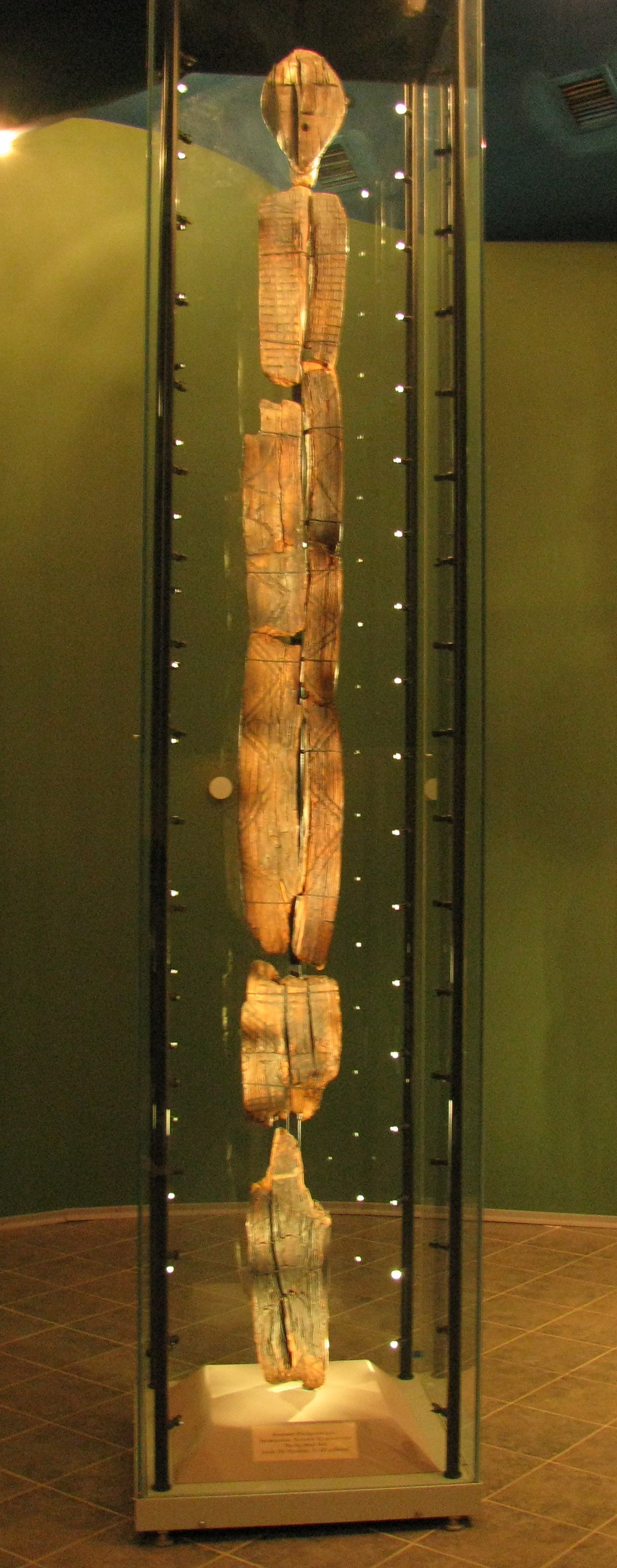 Большой Шигирский идол - самая древняя деревянная скульптура в мире. Проведённый в 1997 году радиоуглеродный анализ показал, что что её возраст составляет около 9,5 тысяч лет. Хранится в Свердловском областном краеведческом музее (г.Екатеринбург).